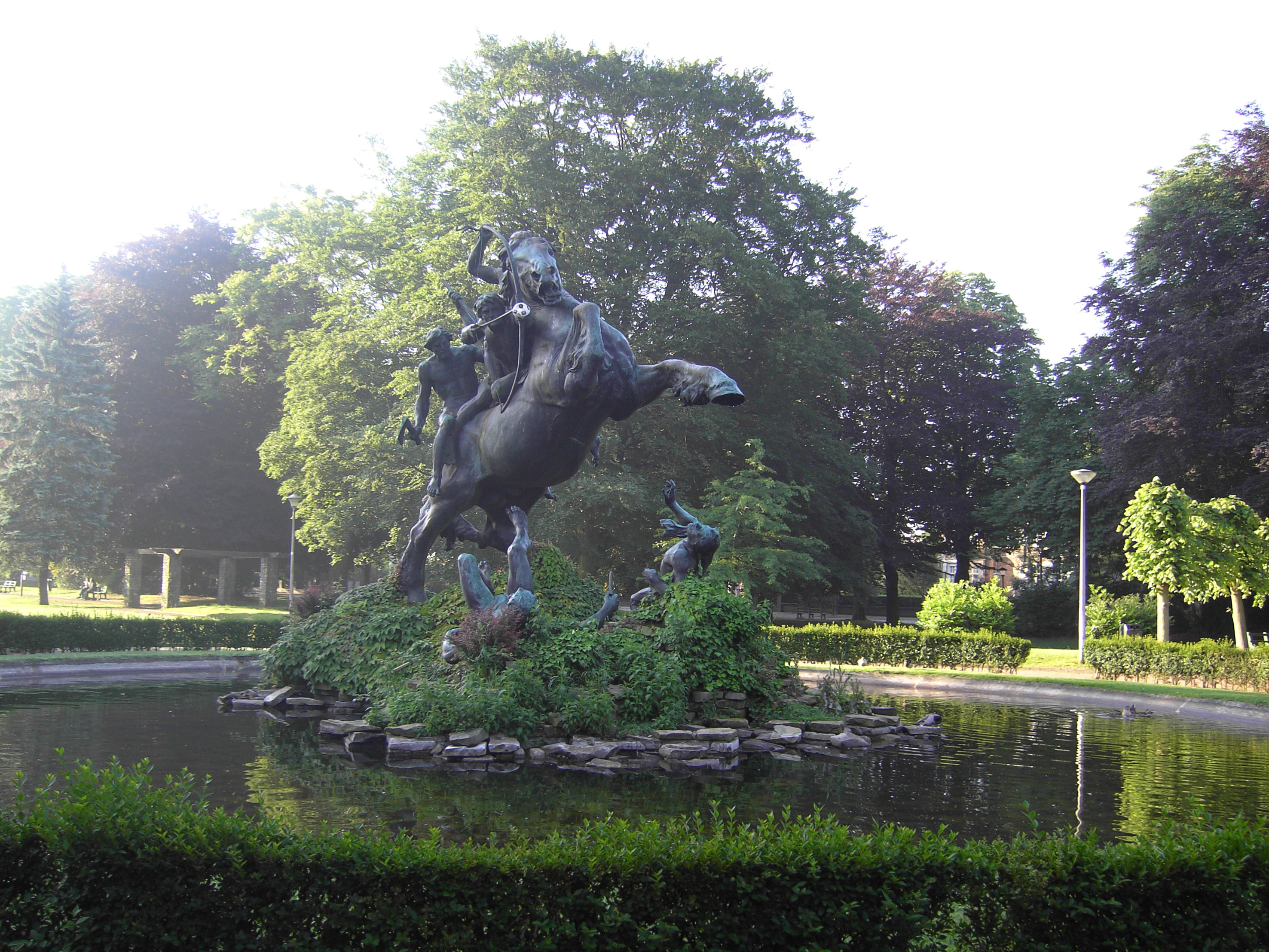 Het Ros Beiaard - Paul de Smet de Naeyerplein - Miljoenenkwartier - wijk Sint-Pieteraalst - Gent - Oost-Vlaanderen - Vlaanderen - België